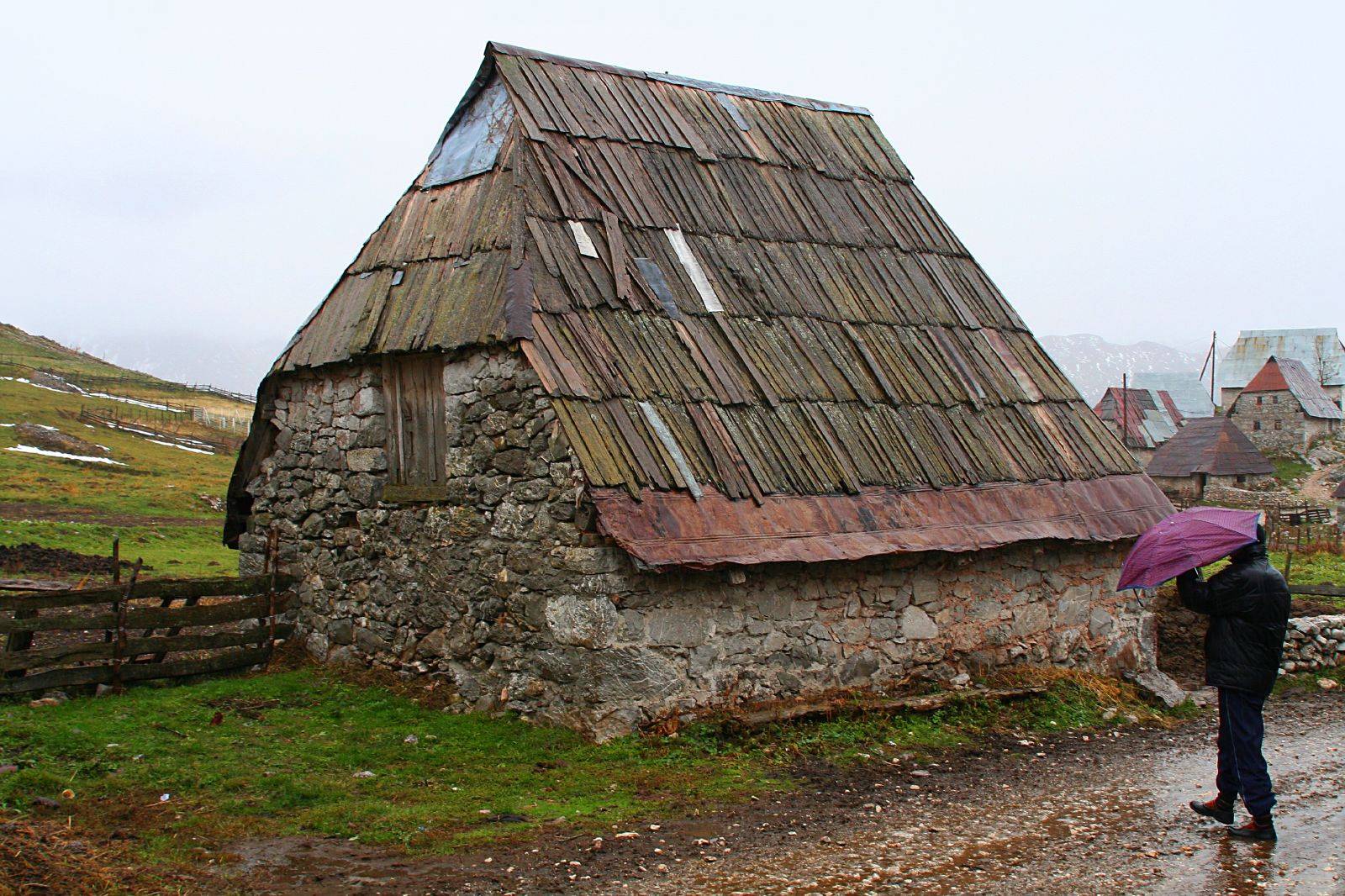 Tipična kuća u Lukomiru.